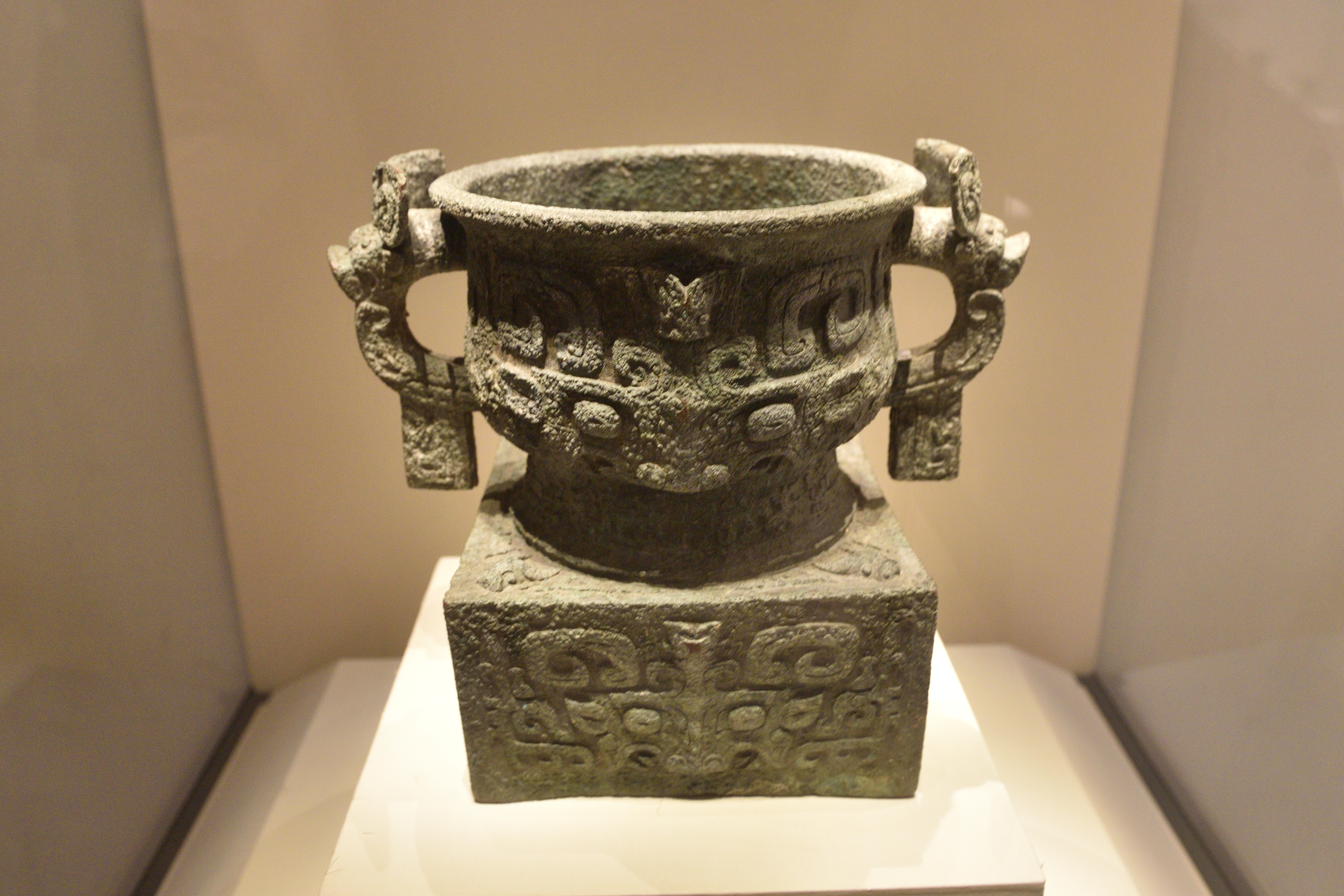 中国国家博物馆藏利簋